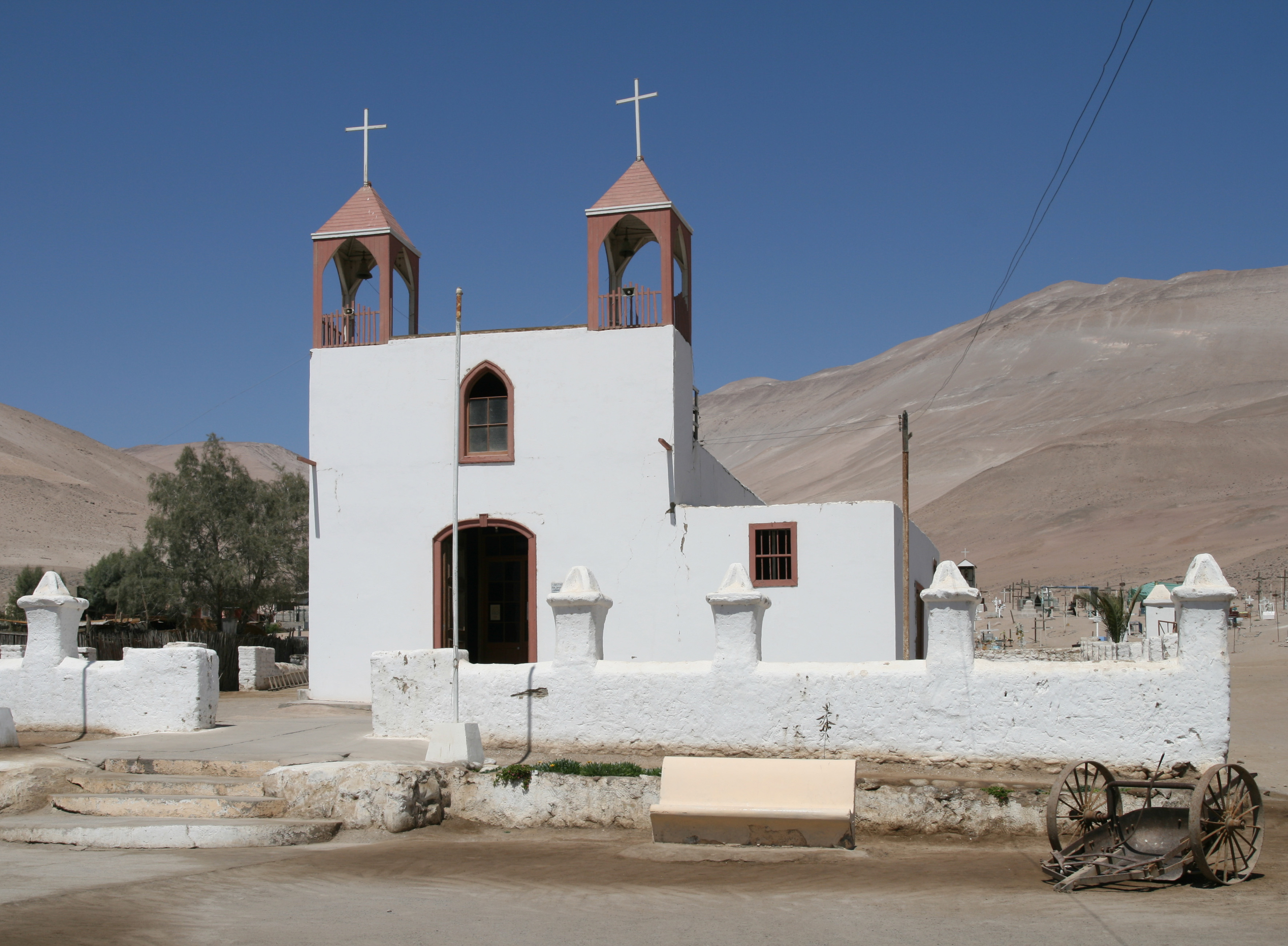 Iglesia de San Gerónimo, en el poblado de Poconchile en el valle de Lluta, Chile.